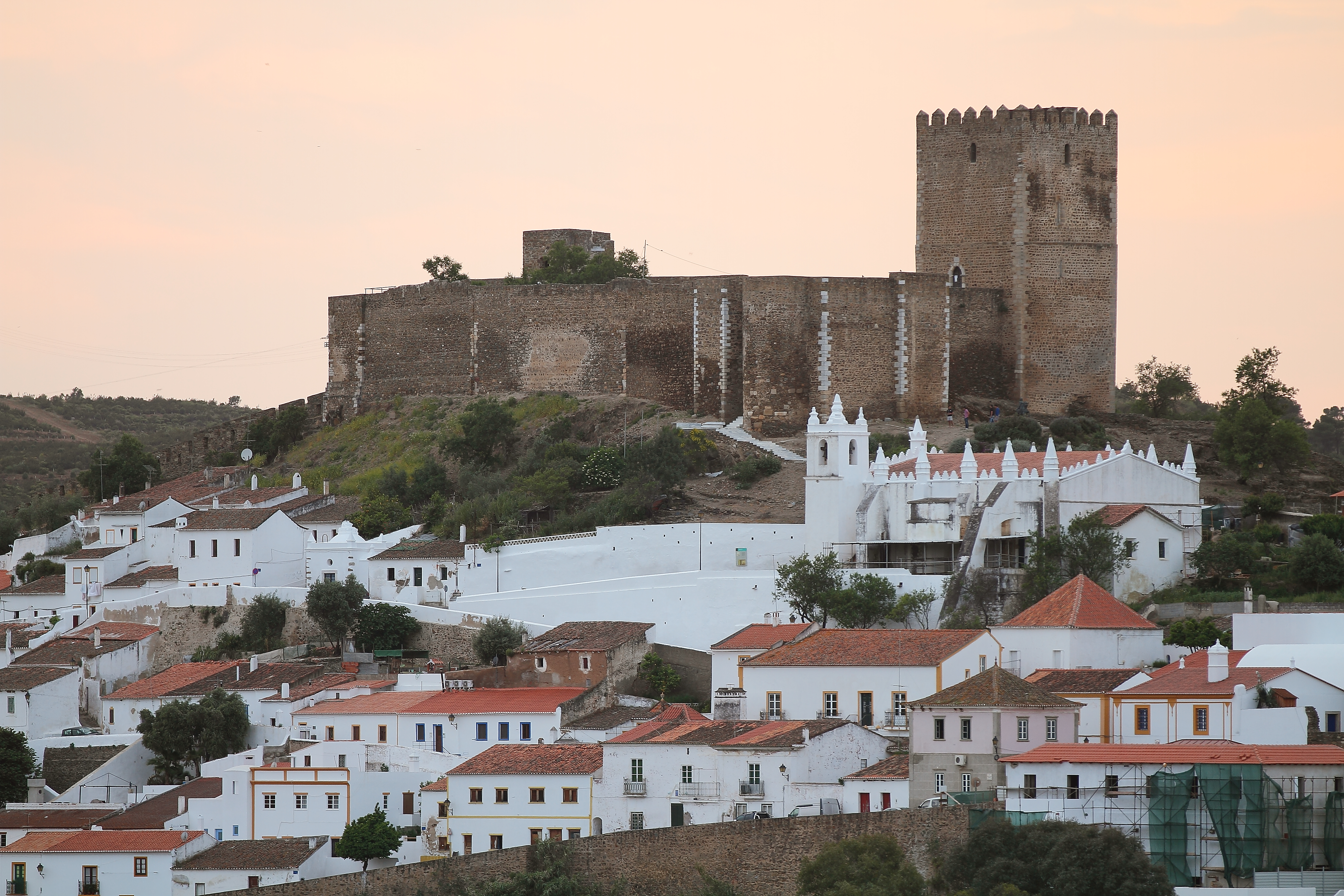 Mértola, Castelo de Mértola - Portugal